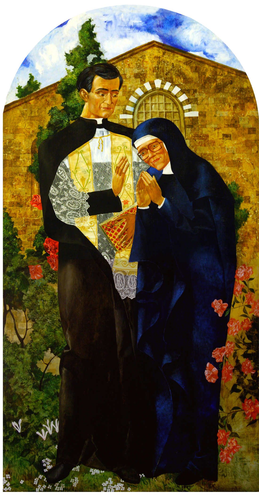 Dipinto realizzato dall'artista Denys Savchenko nella Chiesa dei Santi Pietro e Teresa del Bambin Gesù. Genova, Italia